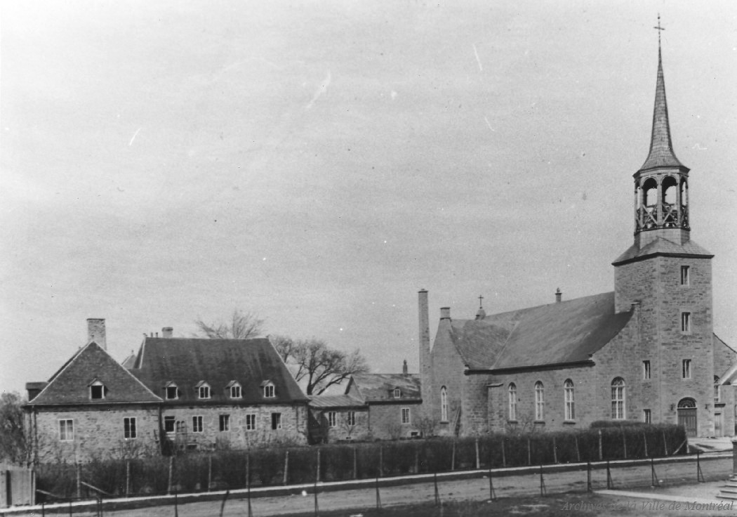 Kahnawake, presbytère (1719) et église Saint-François-Xavier (1845) Lieu historique national du Canada de la Mission-de-Caughnawaga / Mission-Saint-François-Xavier historicplaces.ca